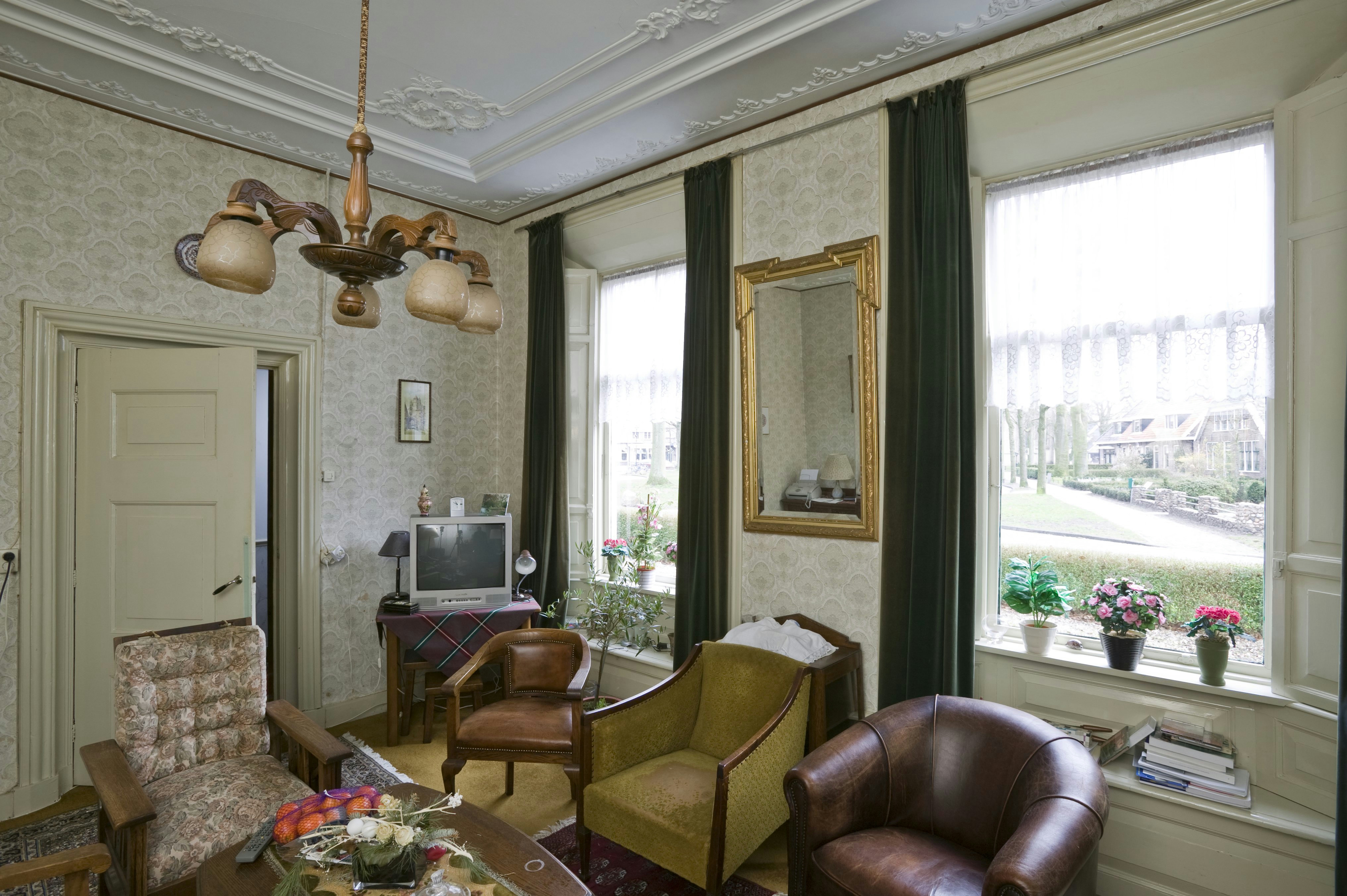 Brink 11: Interieur, overzicht van de pronkkamer in het dwarshuis van de boerderij met een plafond met stucwerk